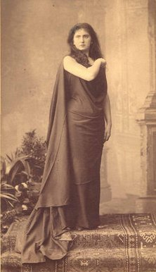 Váradi Antal, Dr.: Az úttörők. Társulat: Nemzeti Színház. Bemutató: 1890.10.24. Szereplők: Balsors: Fáy Szeréna